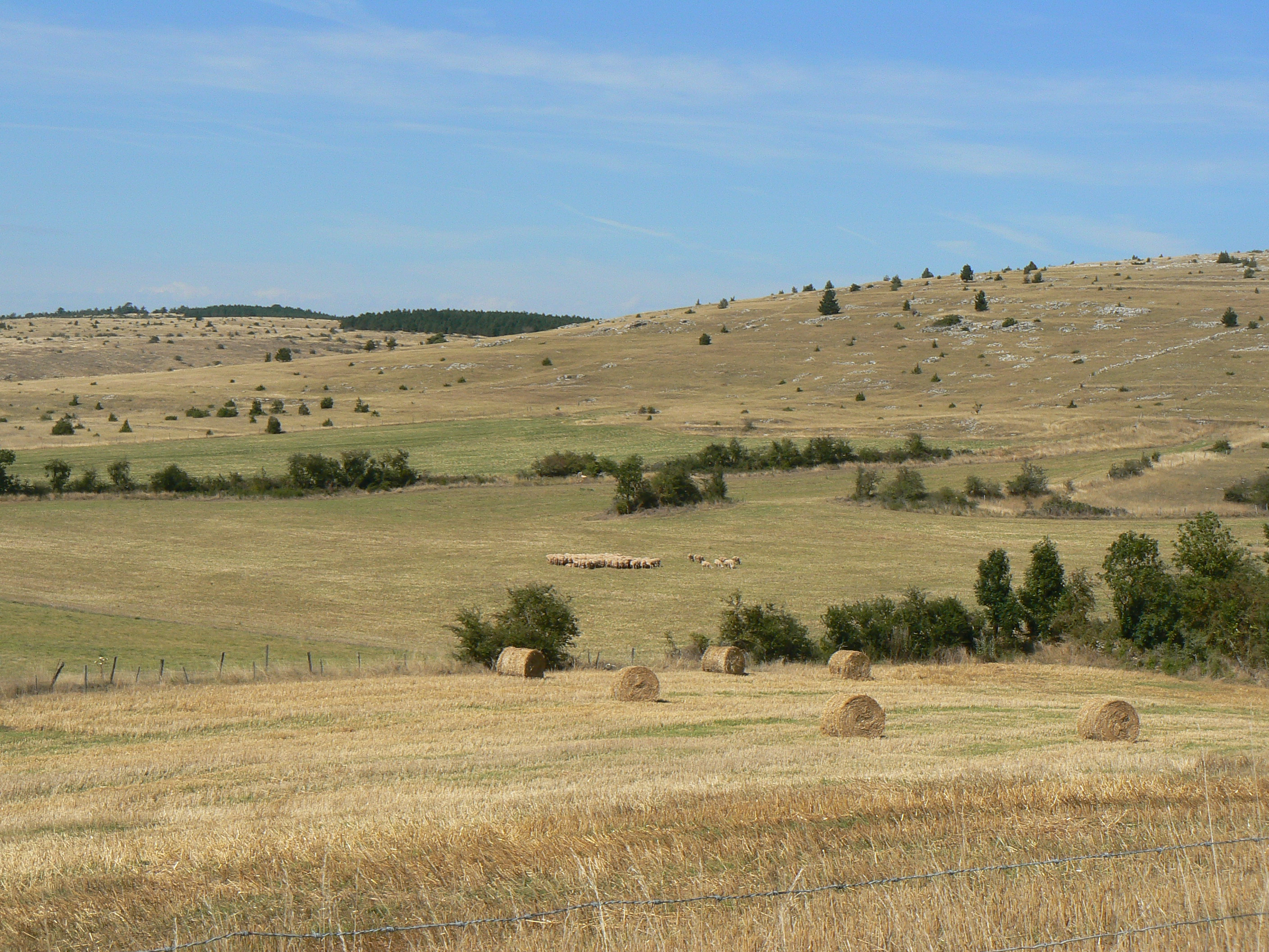 Sur le causse de Sauveterre en Lozère (France)